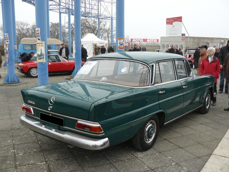 Reims 2012